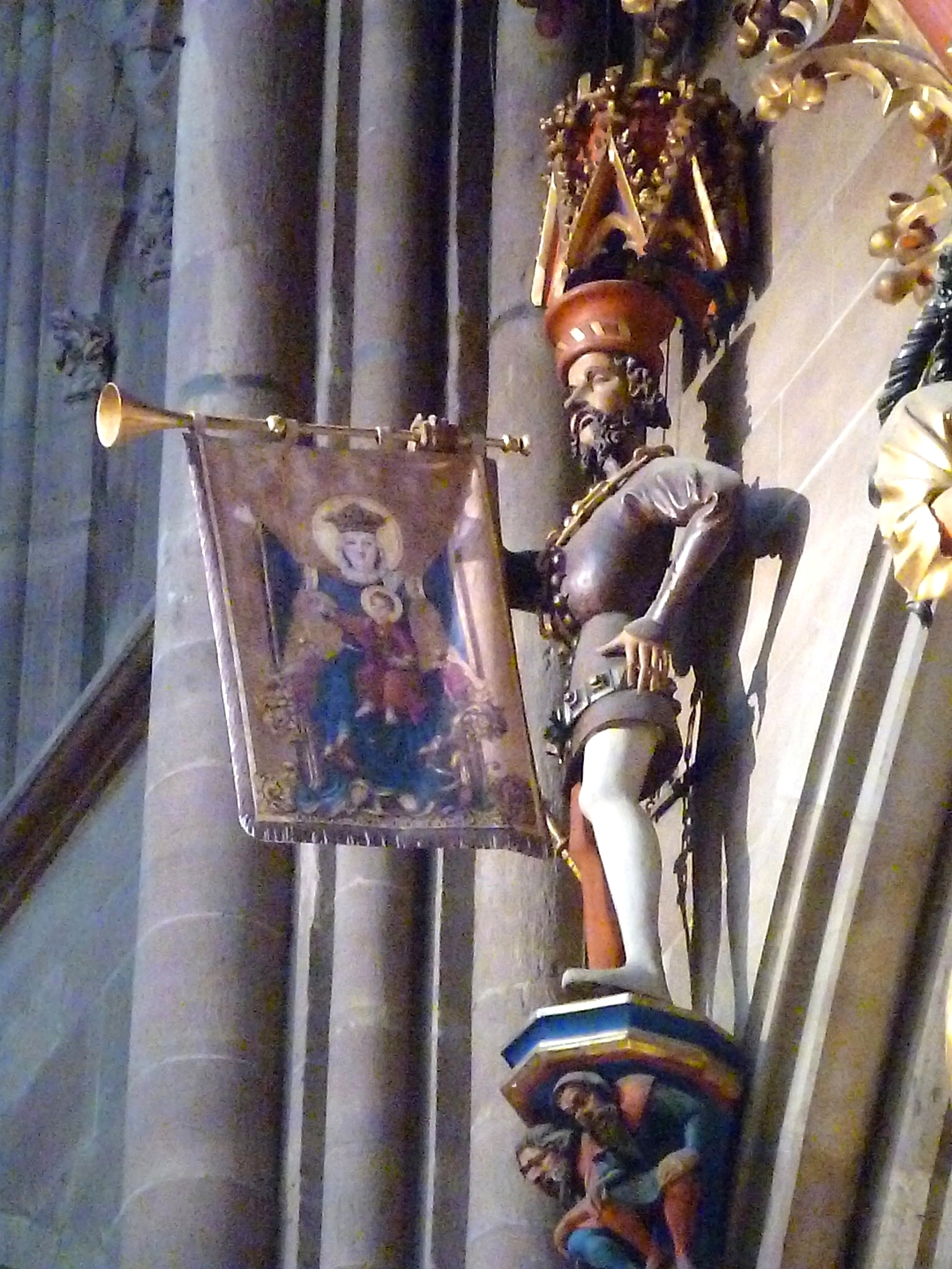 Héraut de la ville de Strasbourg (orgue de la cathédrale)